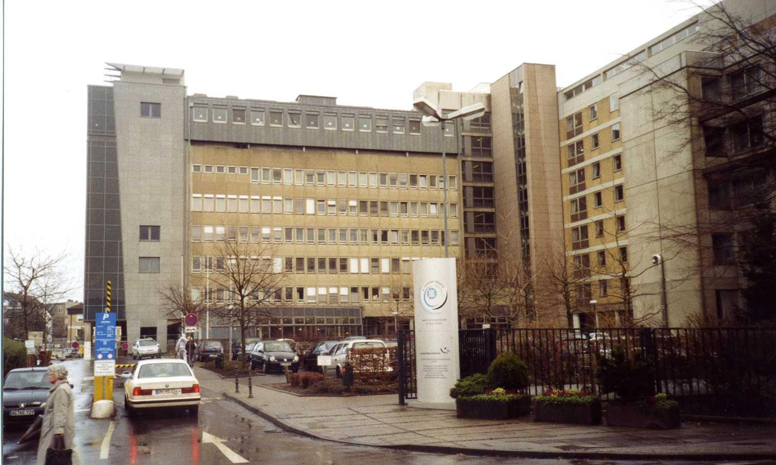 Eingangsbereich des St. Antonius-Hospitals in Eschweiler, Dechant-Deckers-Straße